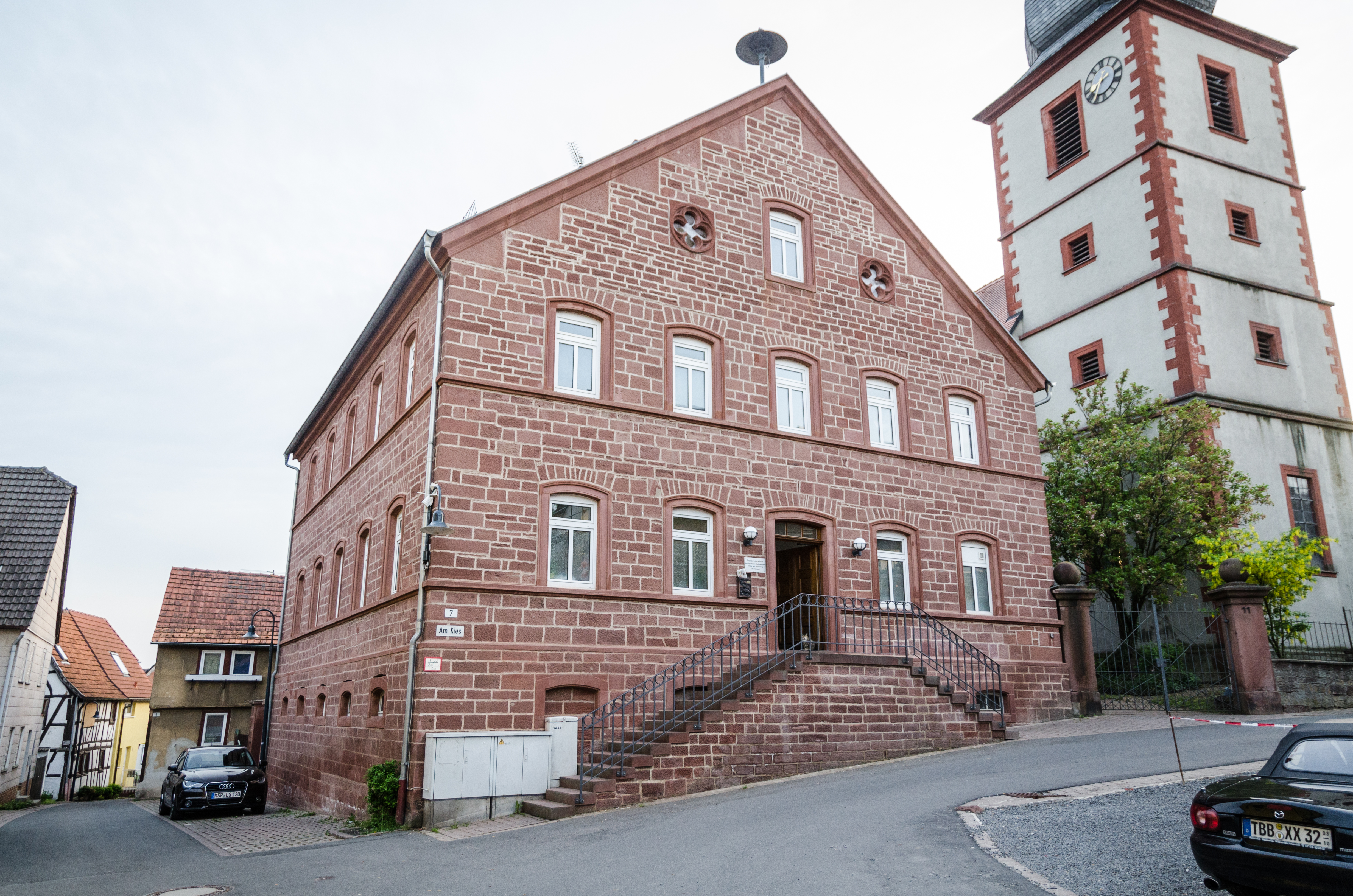 Remlingen, Am Kies 7